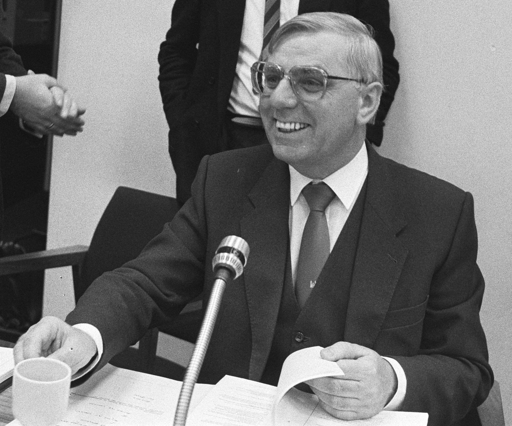 Collectie / Archief : Fotocollectie Anefo Reportage / Serie : [ onbekend ] Beschrijving : Onderonsje tussen minister Deetman (l.), PvdA-woordvoer Niessen (staand) en voorzitter van de vergadering van Erp tijdens gesprek tussen Deetman en Kamercommissie O&W over wet op HB Datum : 10 februari 1986 Locatie : Den Haag, Zuid-Holland Trefwoorden : commissies, ministers, parlementariërs, voorzitters Persoonsnaam : Deetman, Wim, Erp, Broos van, Niessen, Frits Fotograaf : Croes, Rob C. / Anefo, [onbekend] Auteursrechthebbende : Nationaal Archief Materiaalsoort : Negatief (zwart/wit) Nummer archiefinventaris : bekijk toegang 2.24.01.05 Bestanddeelnummer : 933-5637